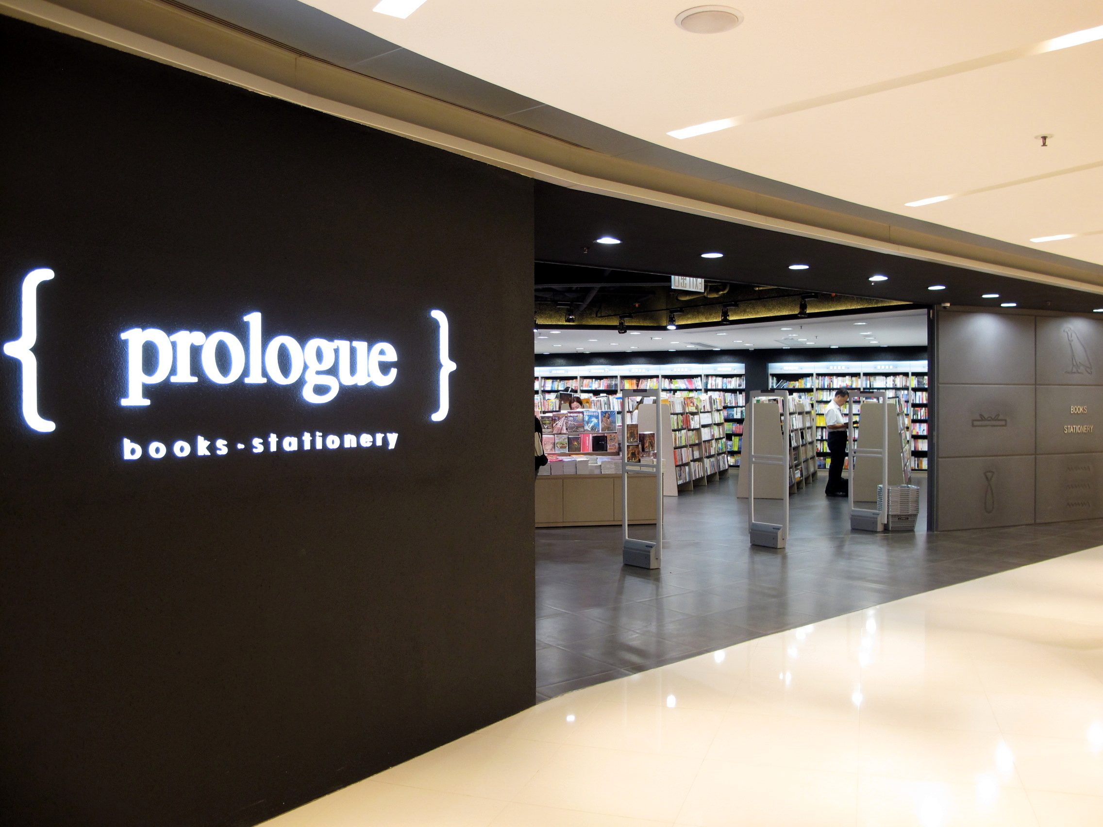 Prologue in Moko Mall, Mong Kok